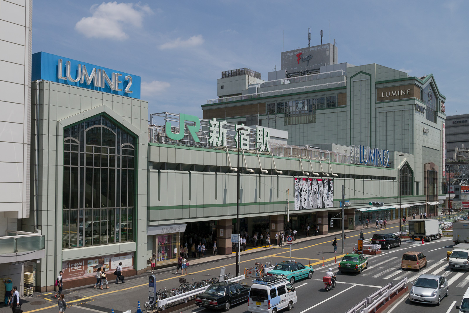 JR東日本新宿駅南口。